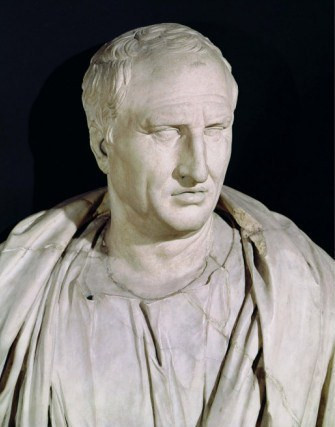 Marek Tuliiusz Cyceron, rzeźba z I wieku po Chrystusie. Muzeum Kapitolińskie.